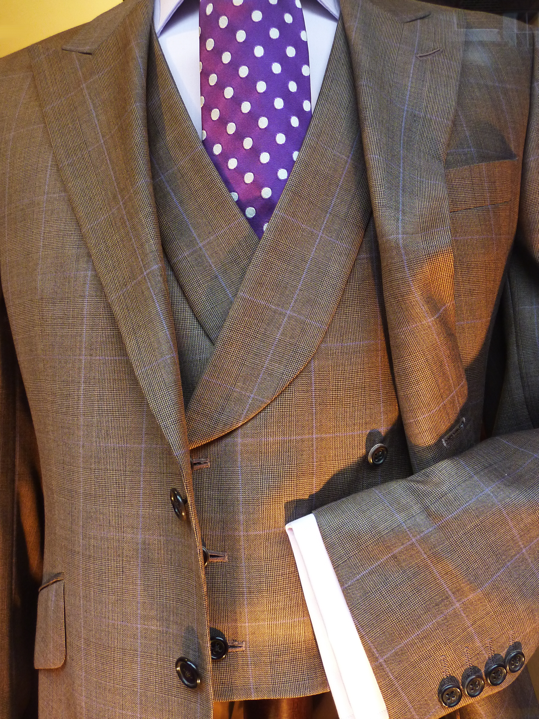 Herrenmode 2011 in London. Anzug mit Weste und Binder.